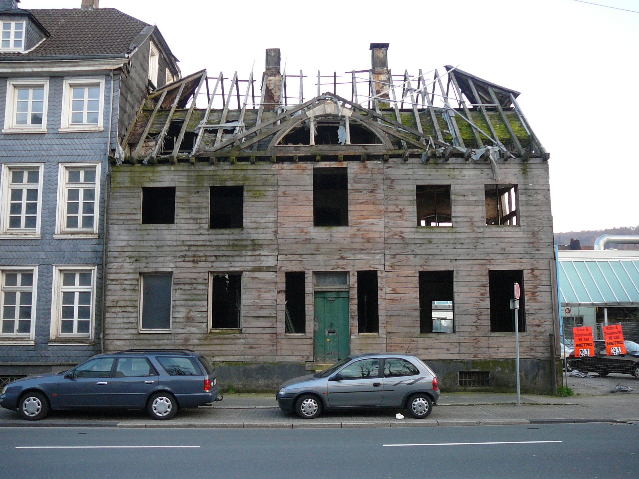 Friedrich-Engels-Allee, Wuppertal